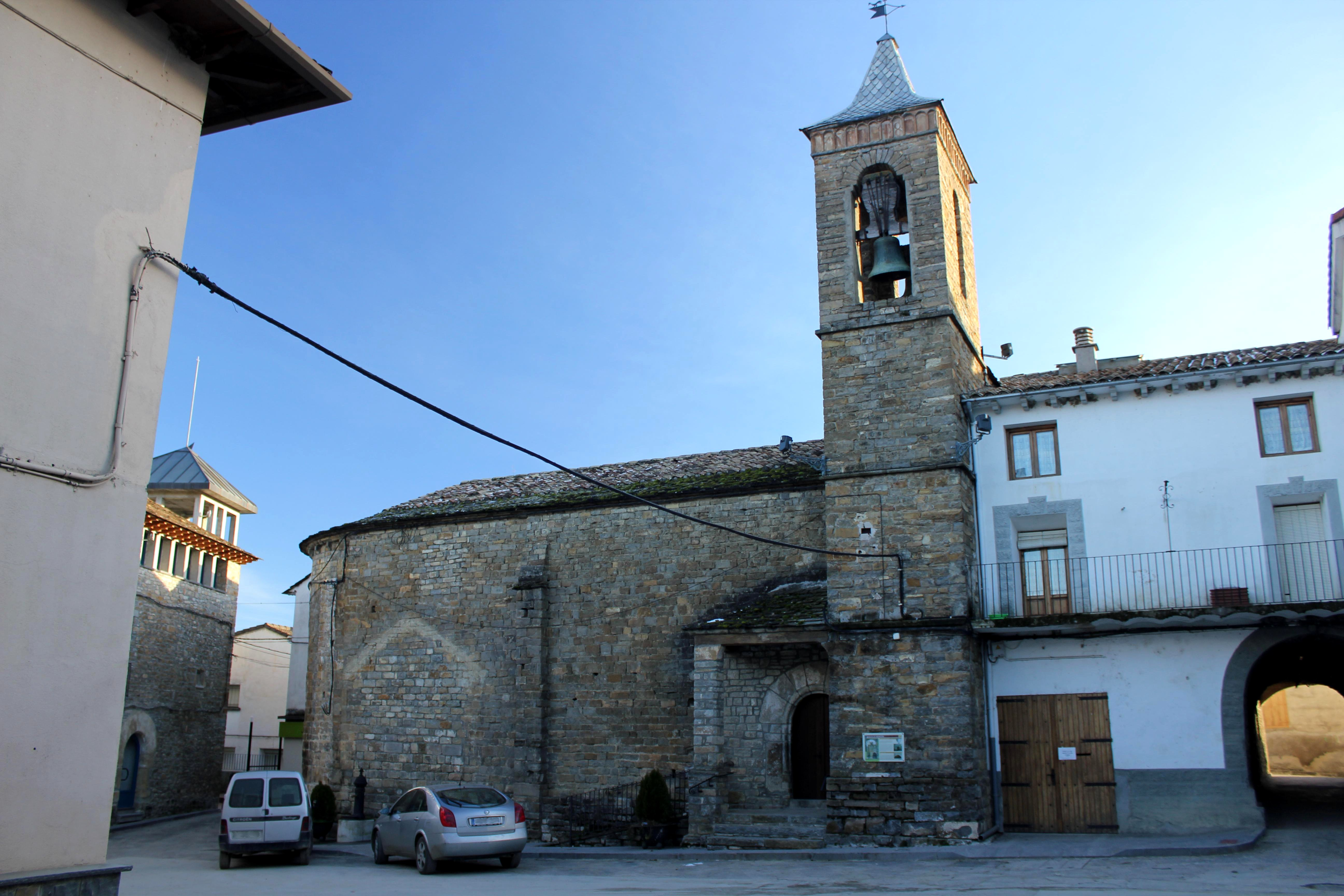 Aragonés: A ilesia de L'Asumpción, en Tierrantona (A Fueva).